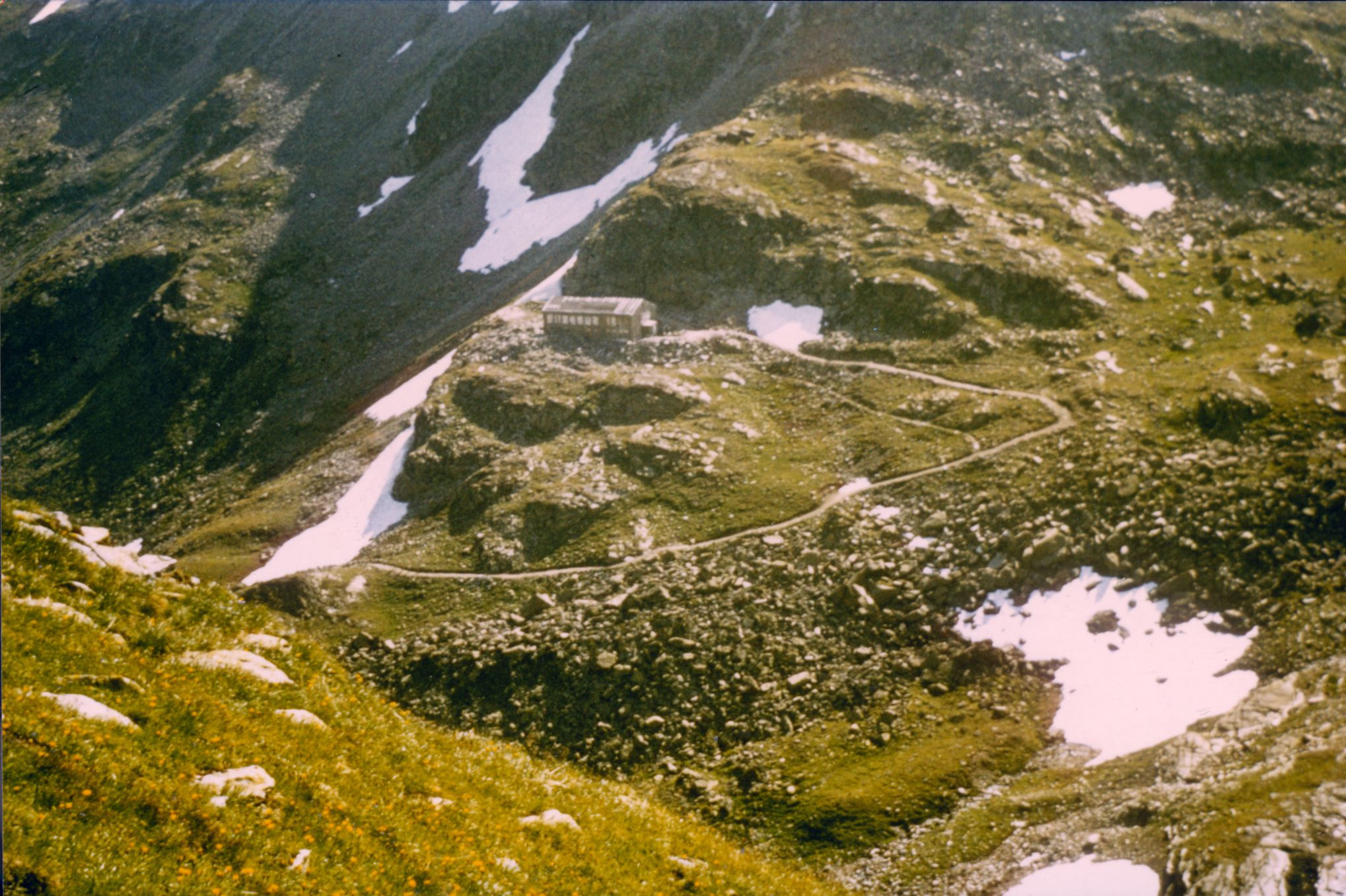 Klostertaler Hütte vom Weg zur Saarbrücker Hütte.